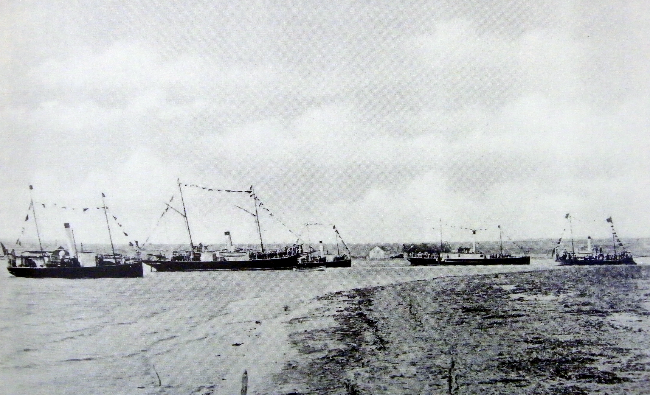 Nave ale Diviziei de Dunare la 1902 - Sursa - fotocopie proprie din Albumul omagial "Armata României - Marelui ei Căpitan" publicat la editura IV Socec în anul 1902 - Restricţii - Fără restricţii datorită vechimii. Imaginea este în domeniul public de la publicare